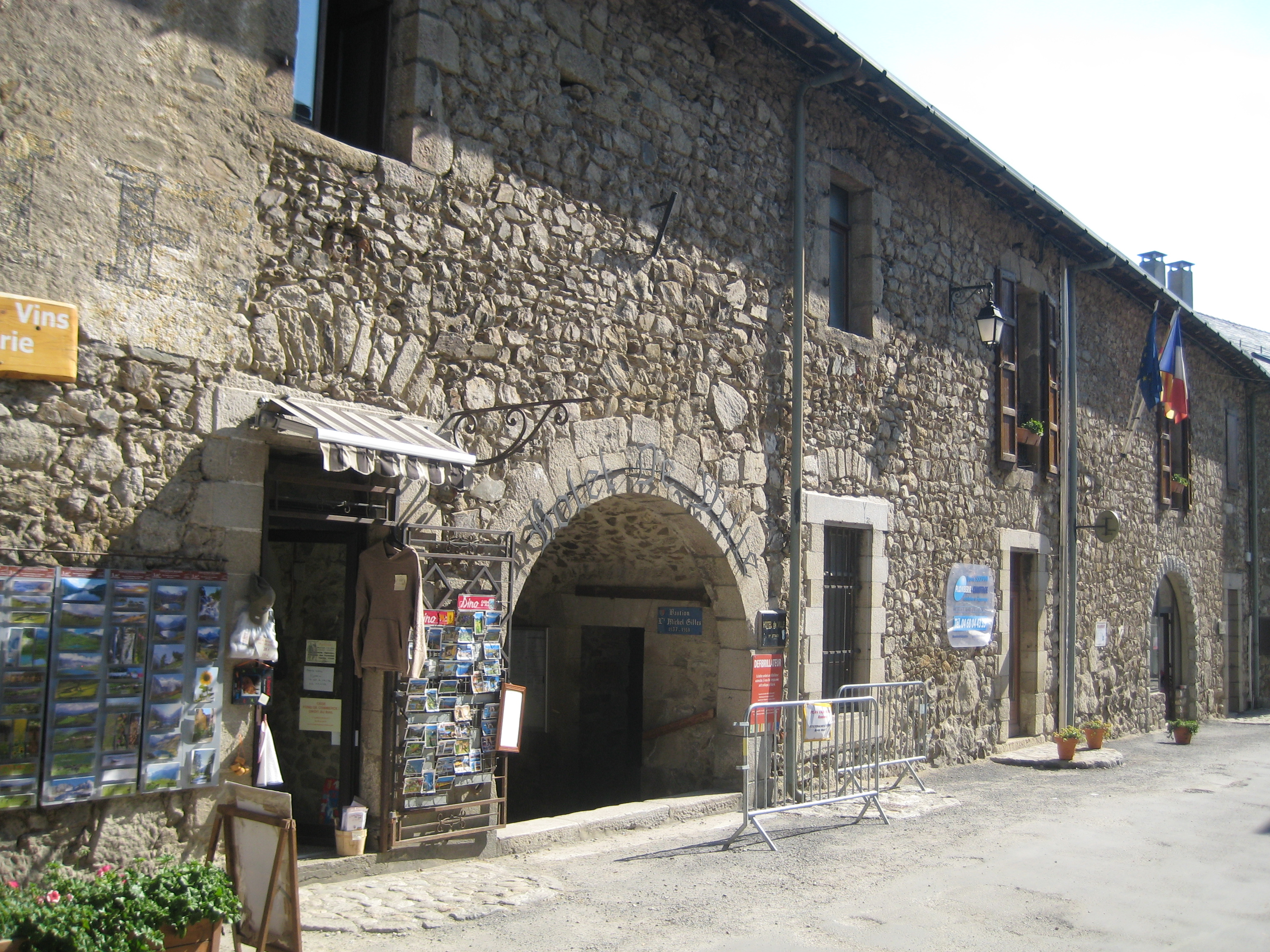 Mairie de Mont-Louis